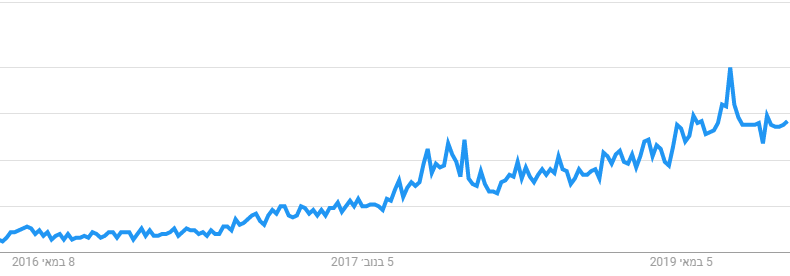 התעניינות בתוכנת טלגרם לפי Google Trends